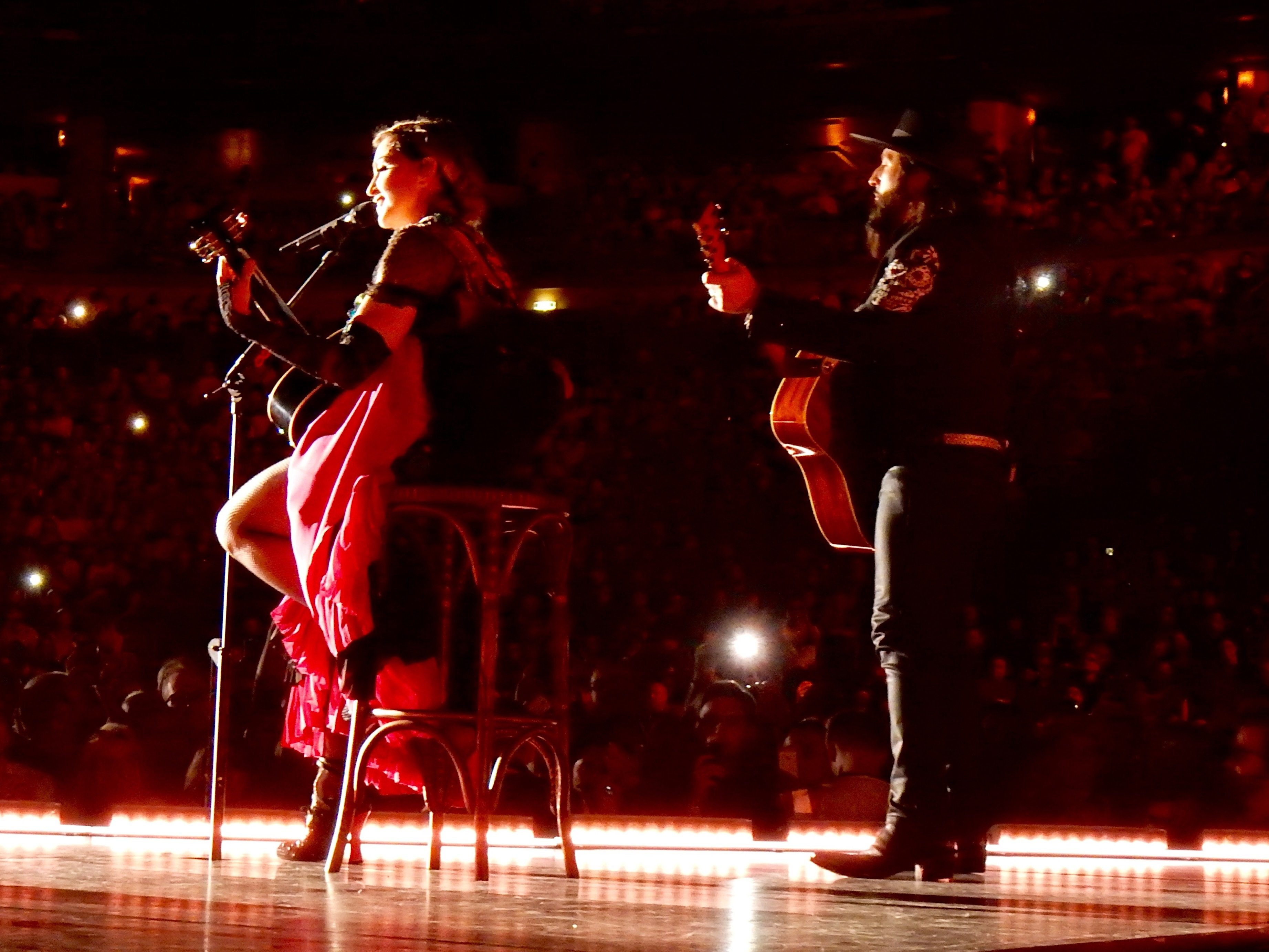 Madonna - Rebel Heart Toru 2015 - Prague 1